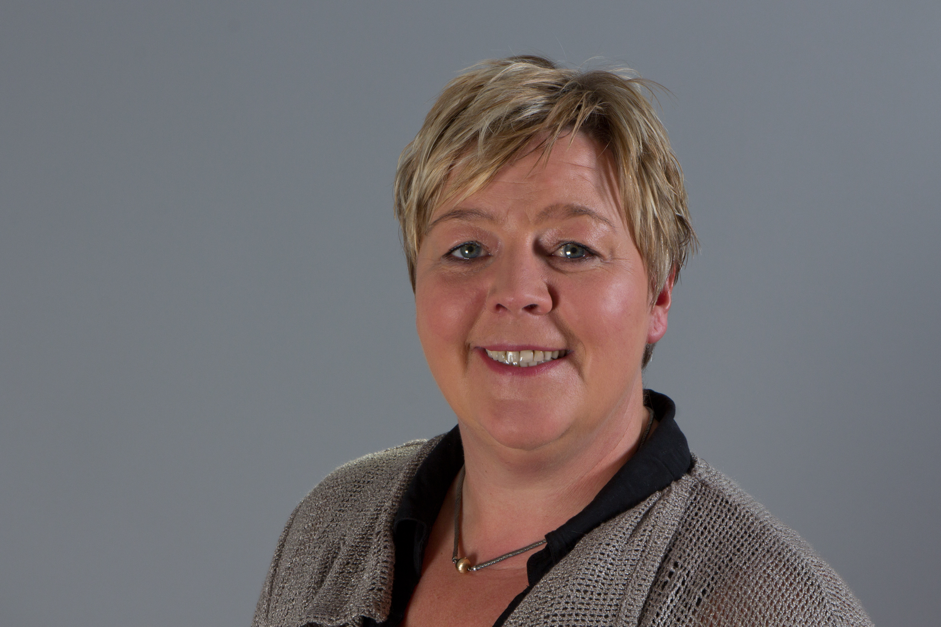 Birte Pauls (* 19. Dezember 1965 in Oersberg) ist eine deutsche Politikerin (SPD) und Mitglied des Landtages von Schleswig-Holstein. Wikipedia im Landtag – Schleswig-Holstein 21.–23. August 2013 in Kiel Fragen zur Nachnutzung Wenn Sie Fragen zur Nachnutzung dieses Bildes haben, können Sie sich jederzeit gern an wenden Personality rights warningAlthough this work is freely licensed or in the public domain, the person(s) shown may have rights that legally restrict certain re-uses unless those depicted consent to such uses. In these cases, a model release or other evidence of consent could protect you from infringement claims.